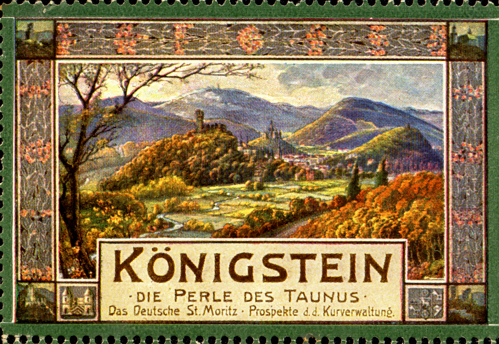 Cinderella-Briefmarke des Landschaftsmalers Ludwig Brühl 1870 - 1924, Inhaber der Pension Germania in Königstein. Originalgröße 7cm x 4,7cm. Auf dem Bilde sind dargestellt: Die Burgen Königstein und Falkenstein, in der Mitte die Villa Andreae, im Hintergrund der Feldbergturm, im Vordergrund am Waldessaum die Synagoge, neben der Burg das Luxemburgische Schloss und die Katholische Kirche. Die Bildaufschrift lautet:"Königstein - Die Perle des Taunus - Das Deutsche St.Moritz - Prospekte d.d.Kurverwaltung."